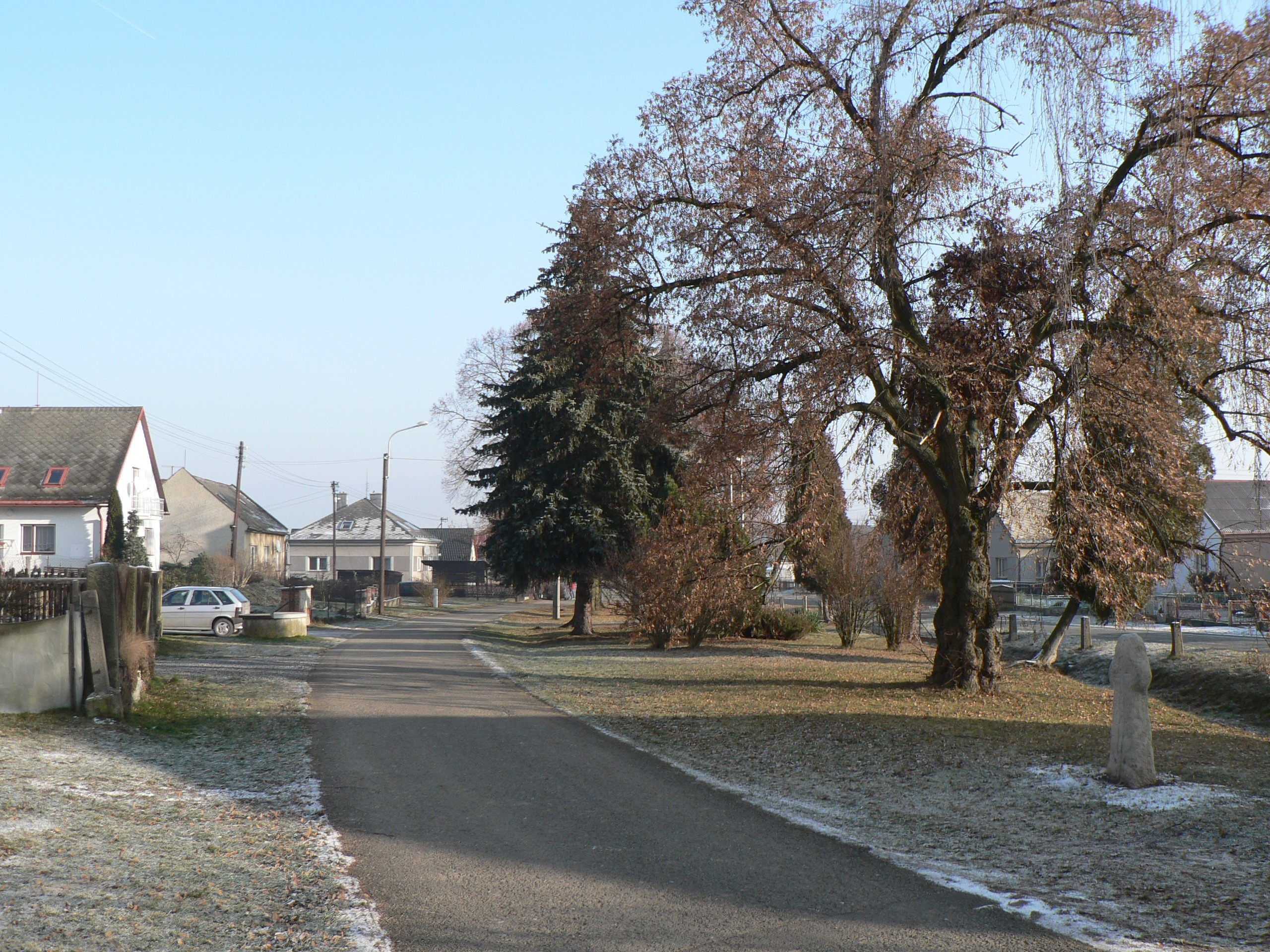 Náves v Rájci se smírčím křížem ze 16. století